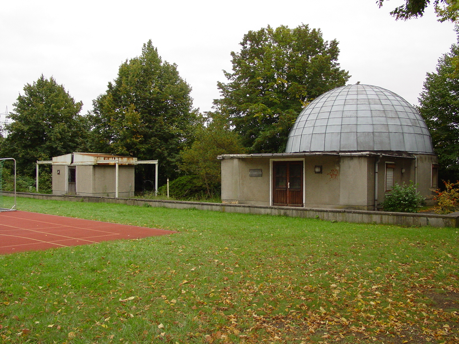 Astronomische Station "Samuel Heinrich Schwabe" ursprünglich